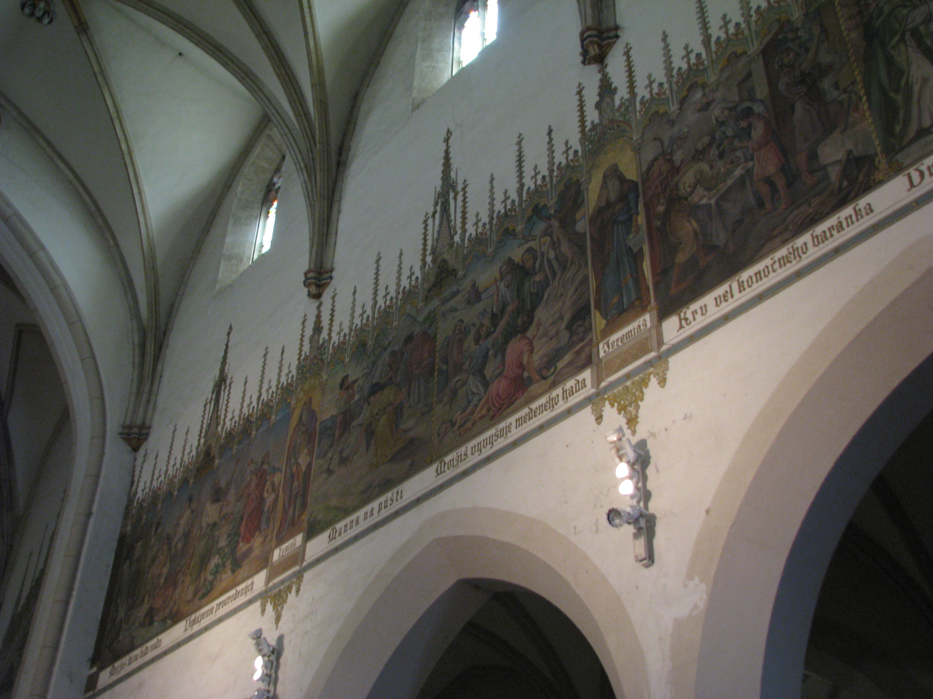 Neugotische Wandgemälde im Obergeschoß des Nikolaus-Doms zu Tyrnau